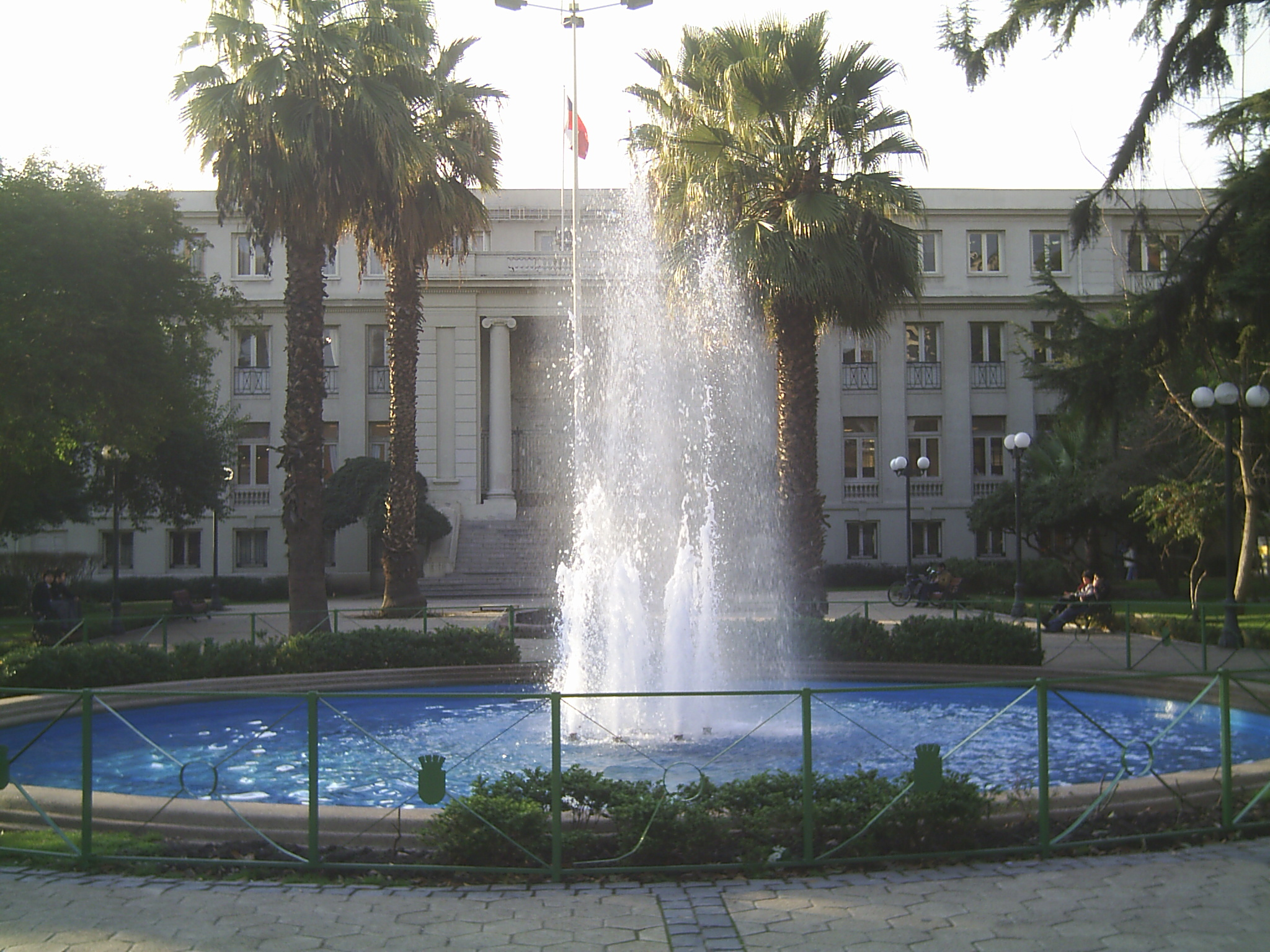 Pileta de la plaza Ñuñoa